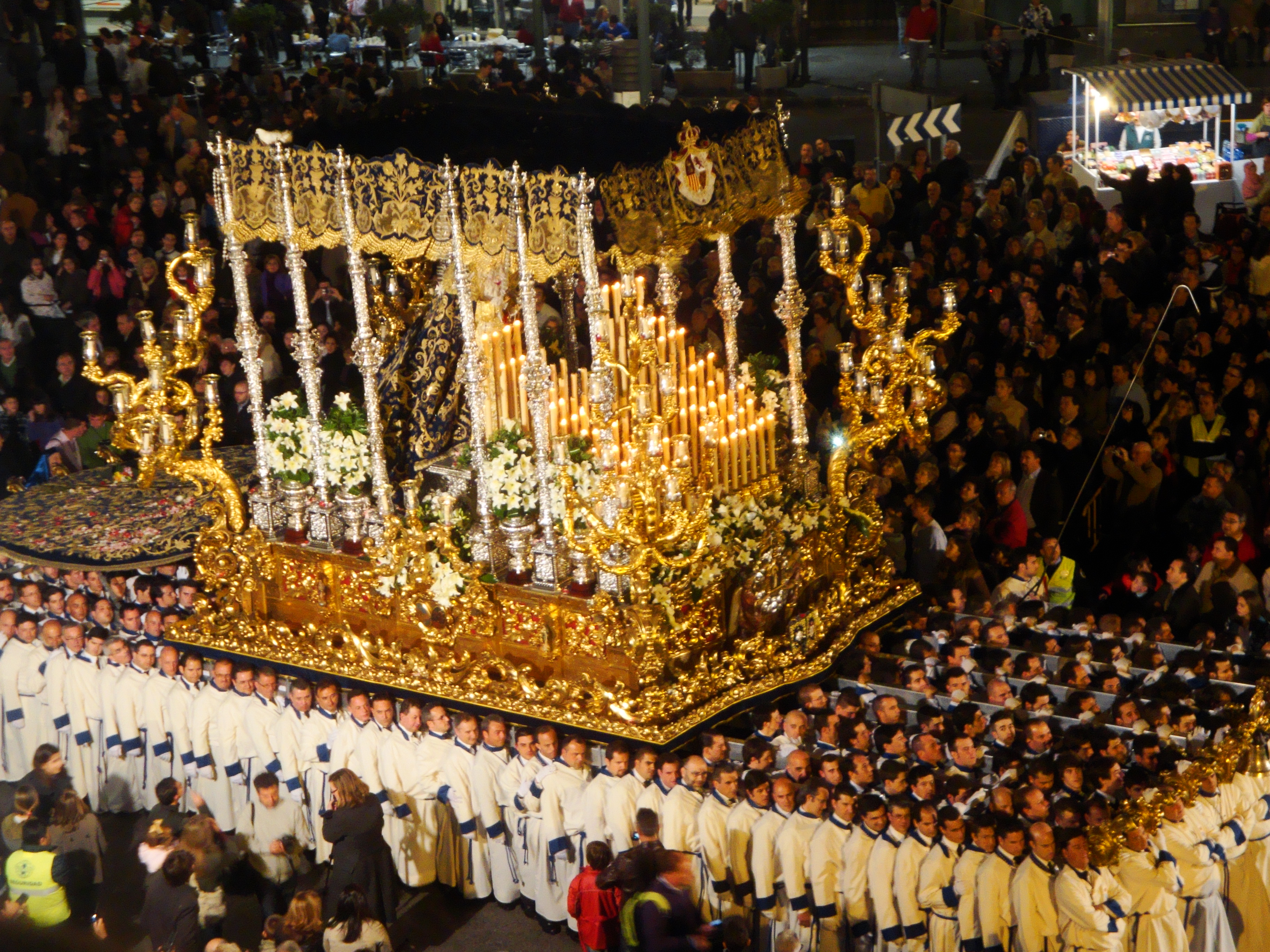 2010 Holy Week in Málaga